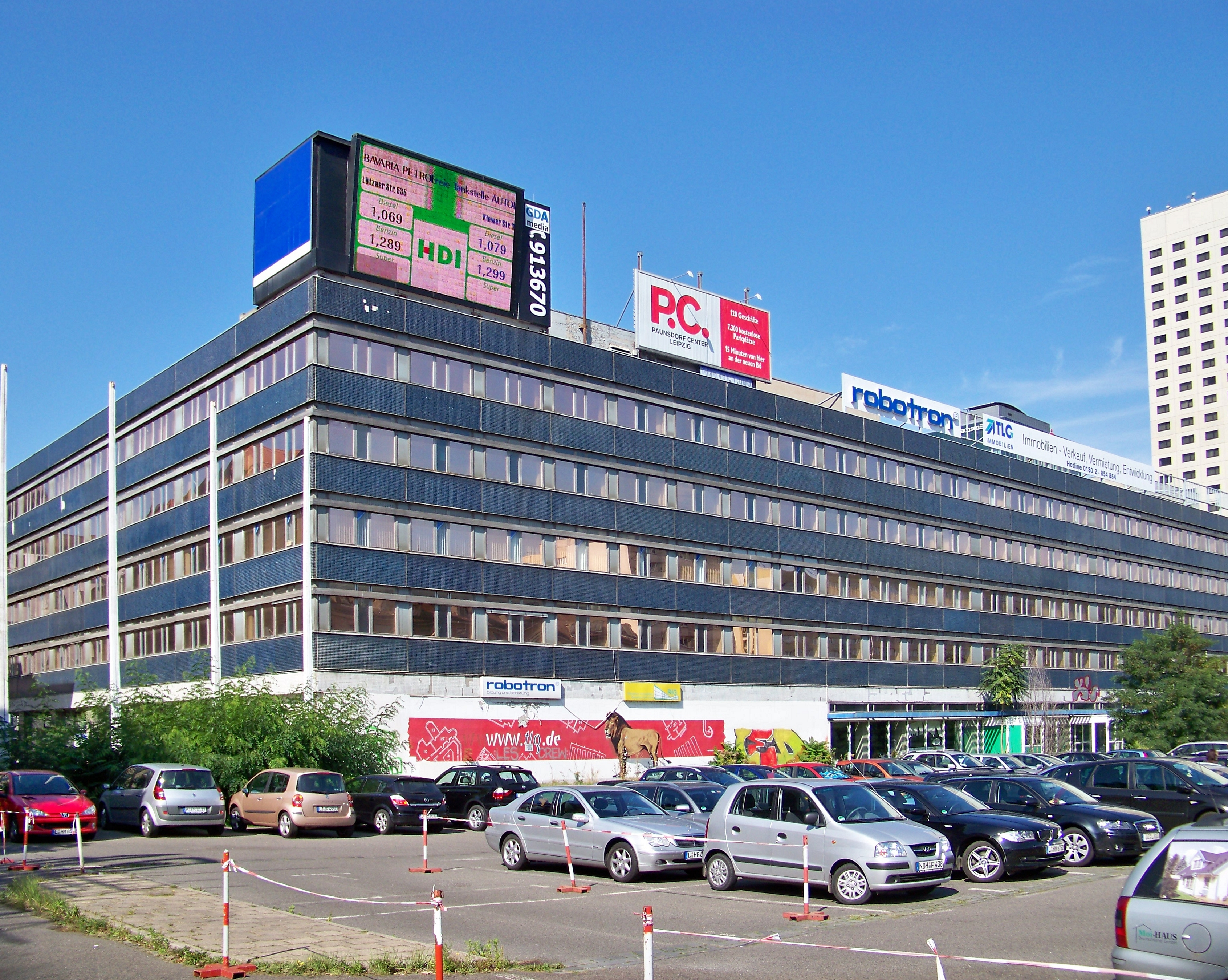 Robotrongebäude am Tröndlinring/Gerberstraße in Leipzig